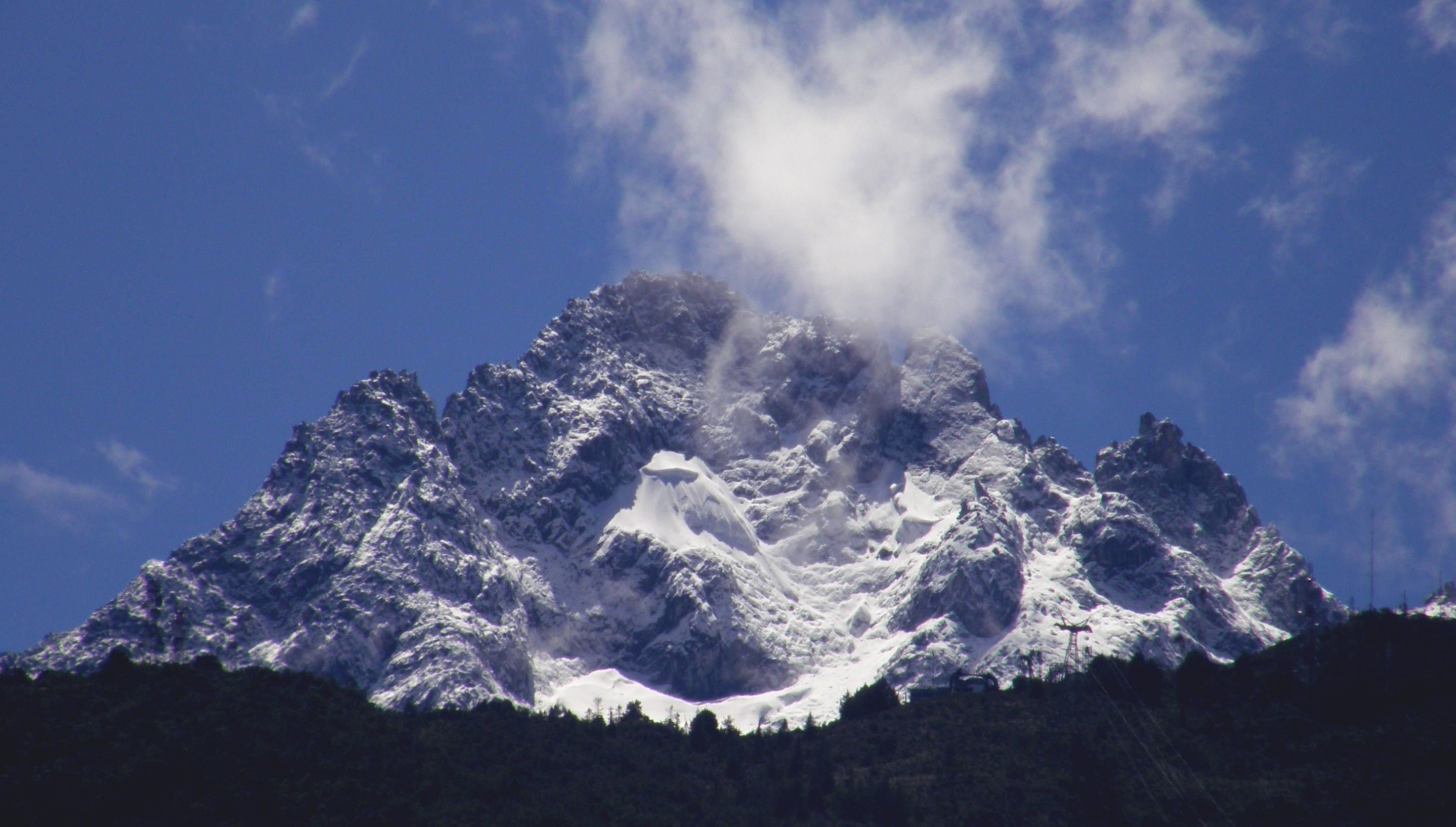 Día de nevada en la sierra homónima.